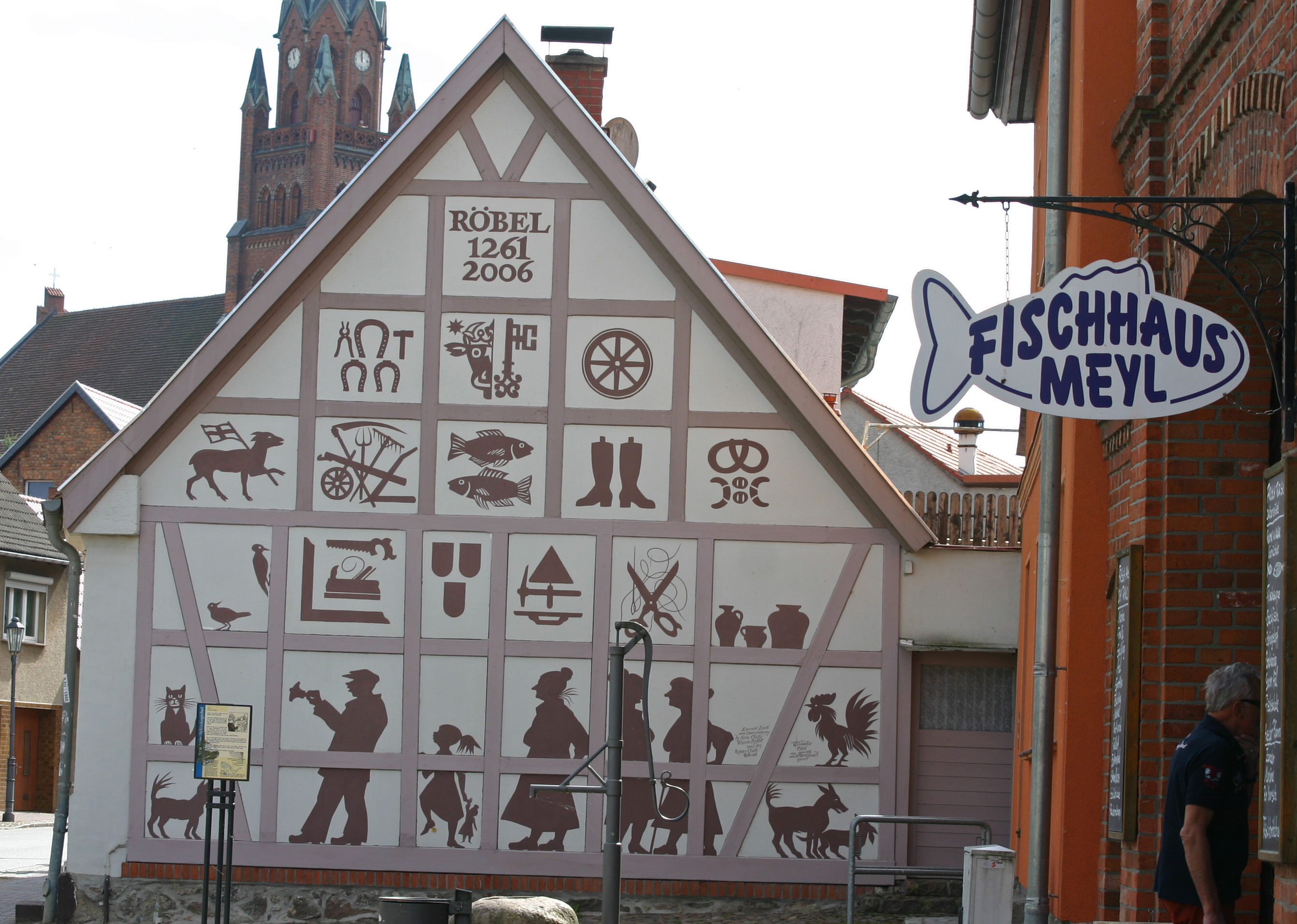 Wandbild von Werner Schinko in Röbel, Straße der Deutschen Einheit Nr. 47 Inschrift: W. Schinko 1986, neu gemalt mit H. Wiedbusch 2006